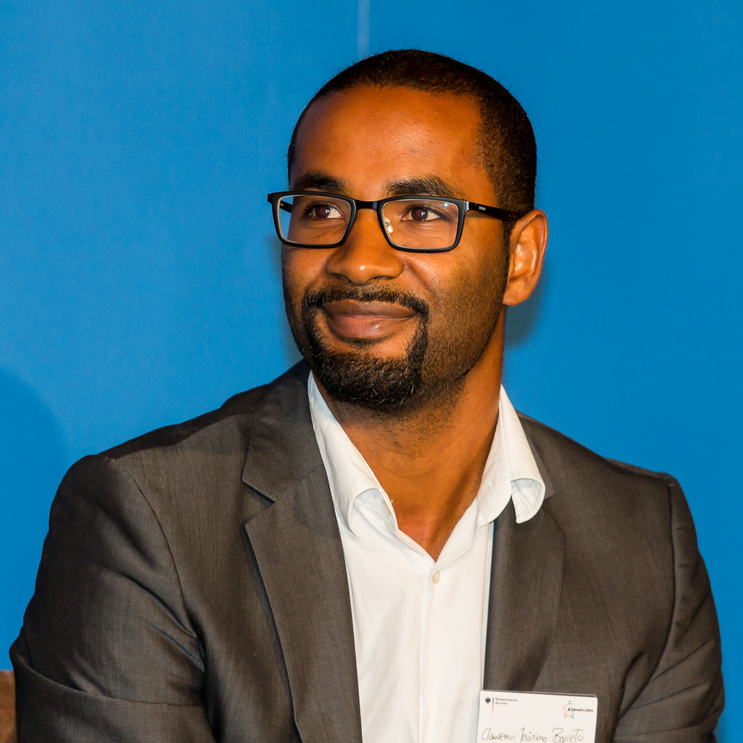 Werkstattreihe #gemeinsam für ein starkes Deutschland. Wie gelingt Integration? Wie hält eine Gesellschaft zusammen? Veranstalter: Bundesministerium des Innern. Veranstaltungsort: Alter Wartesaal Köln Foto: Claudemir Jerônimo Barreto - Cacau